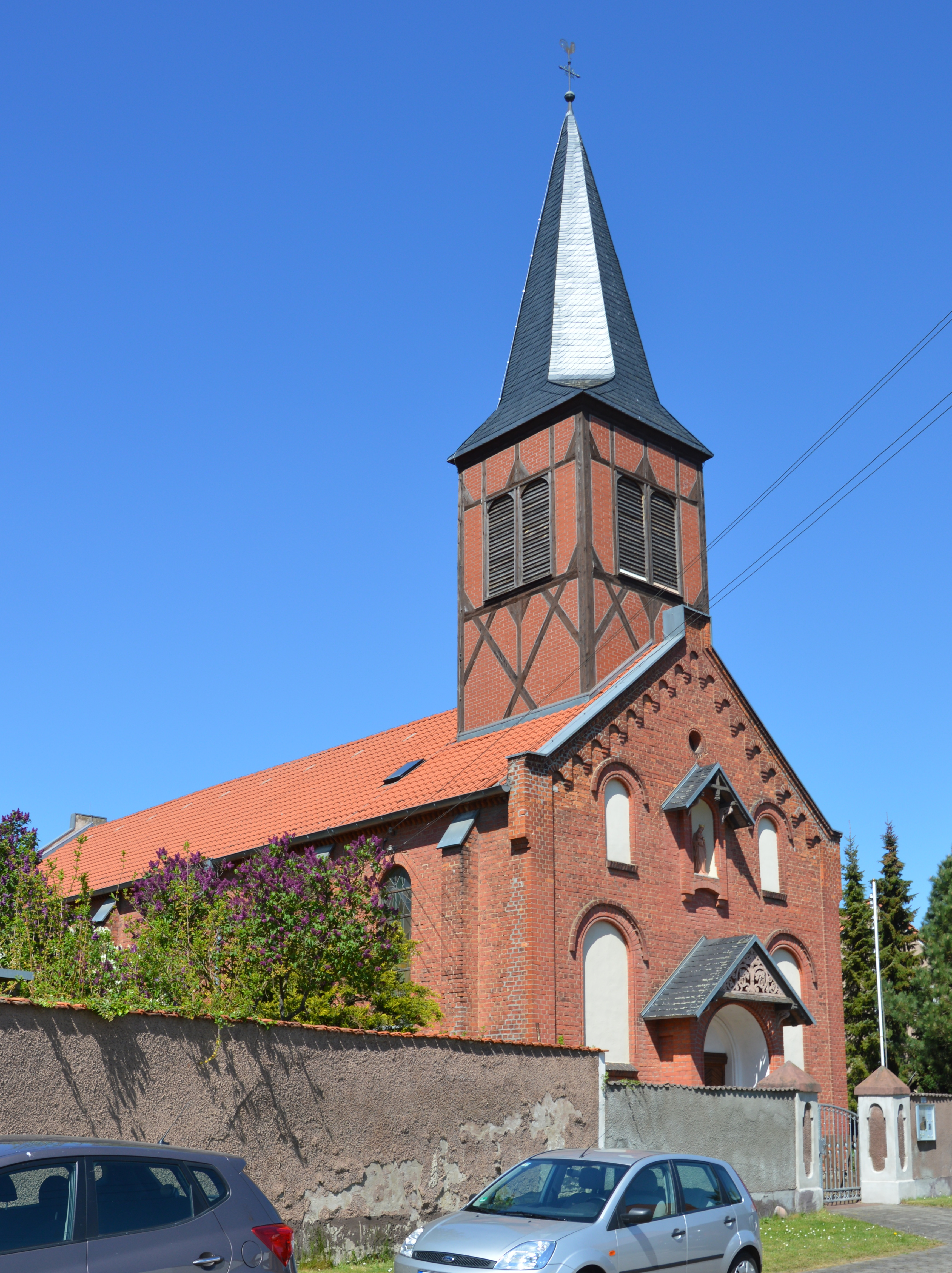 Katholische Kirche in Bahrendorf